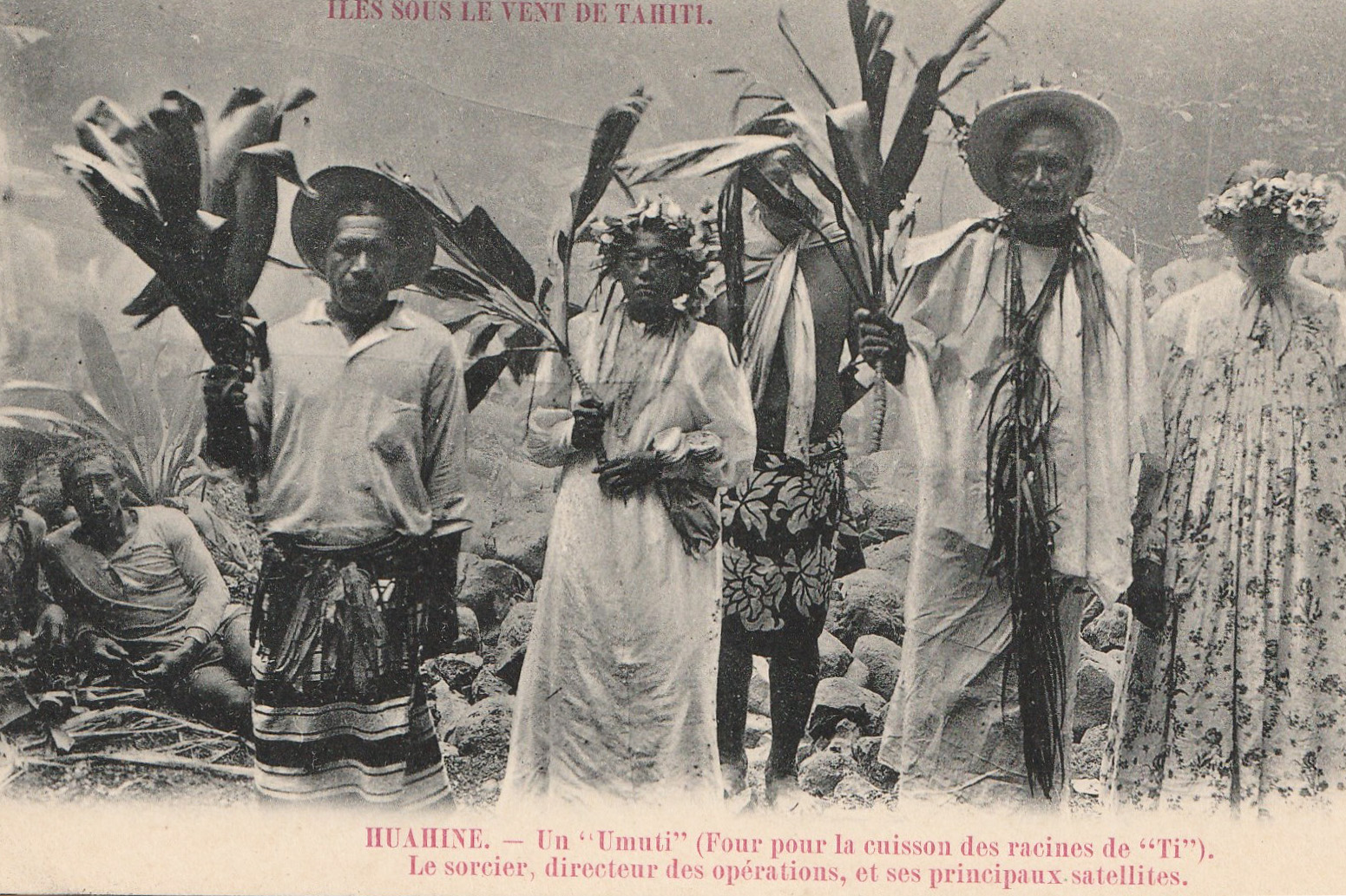 Iles Sous le Vent de Tahiti. Huahine. Un Umuti (Four pour la cuisson des racines de Ti) - Le sorcier, directeur des opérations, et ses principaux satellites. Carte postale ancienne.